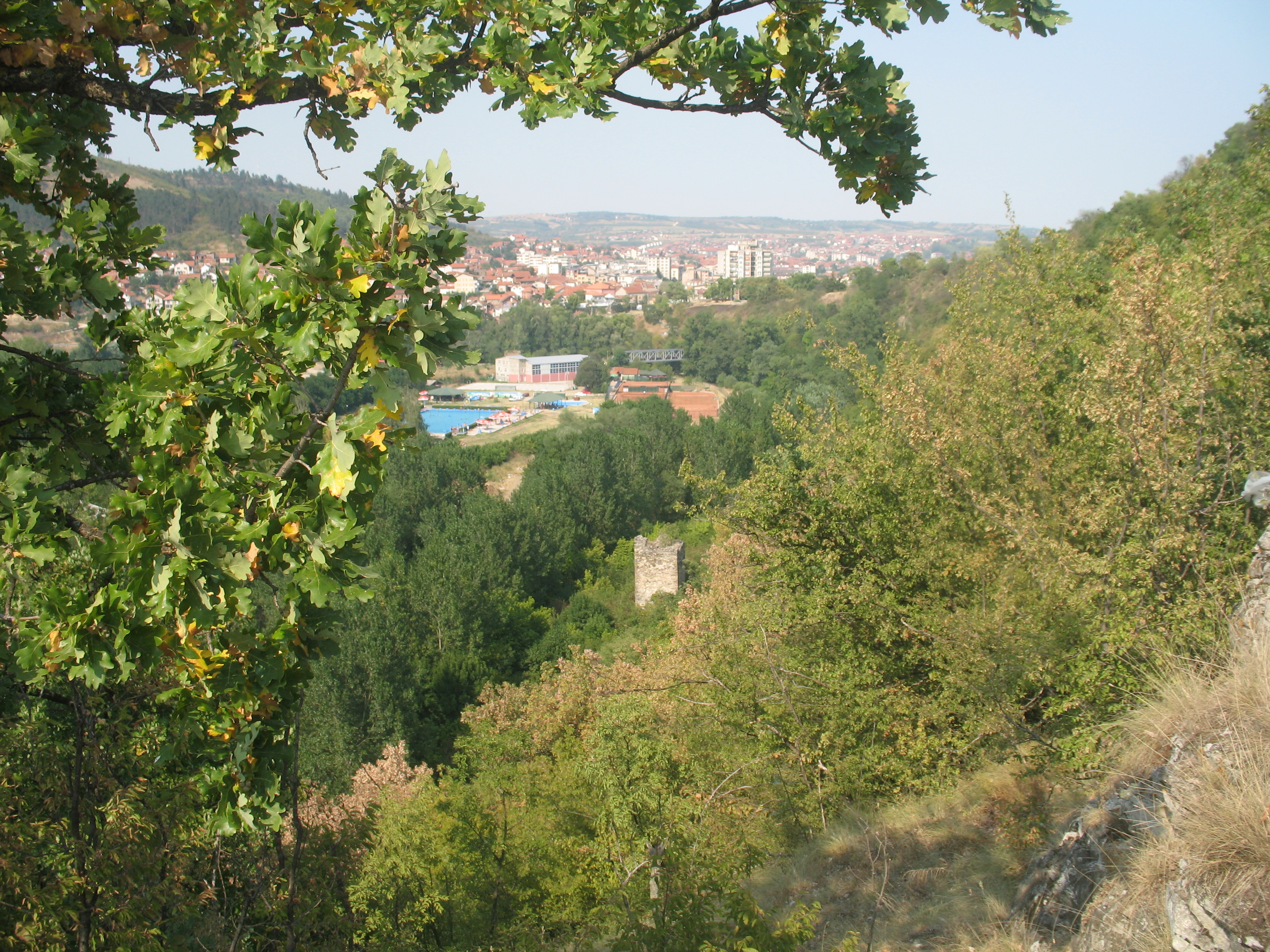 "Hisar" in Prokuplje, Jug Bogdans tower